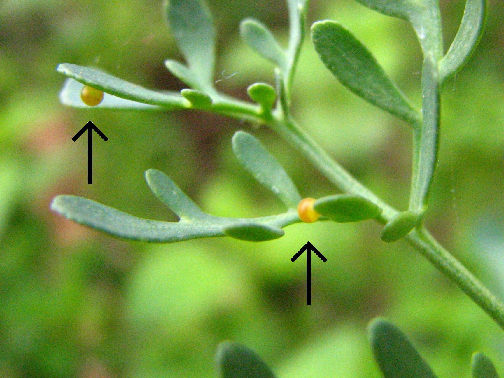 Papilio machaon's eggs on rue leaves